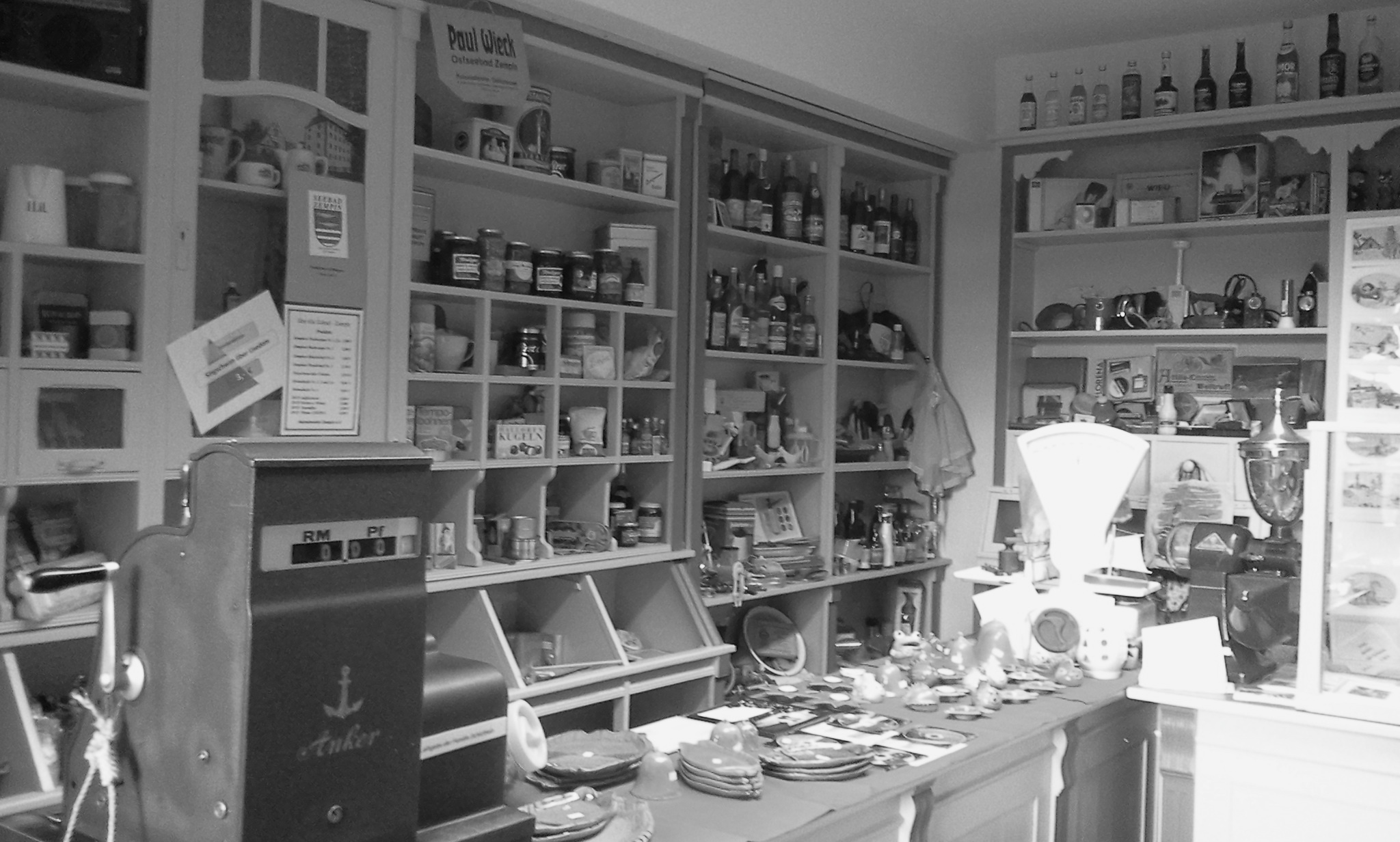 Heimatmuseum Zempin, Usedom. Der Kolonialwarenladen. 1928 in Swinemünde gebaut.